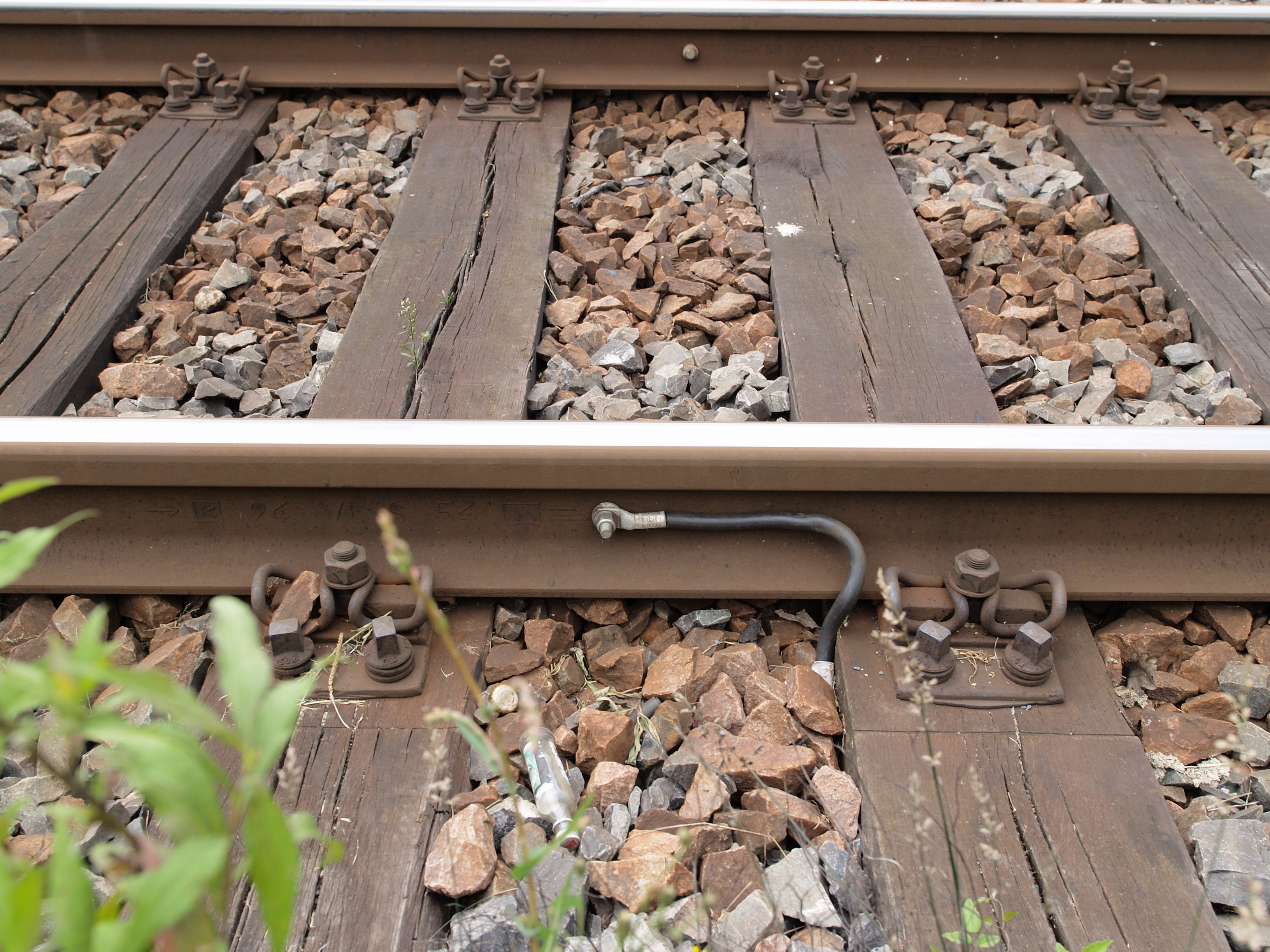 Erdung eines Bahngleises